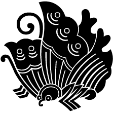 日本の家紋